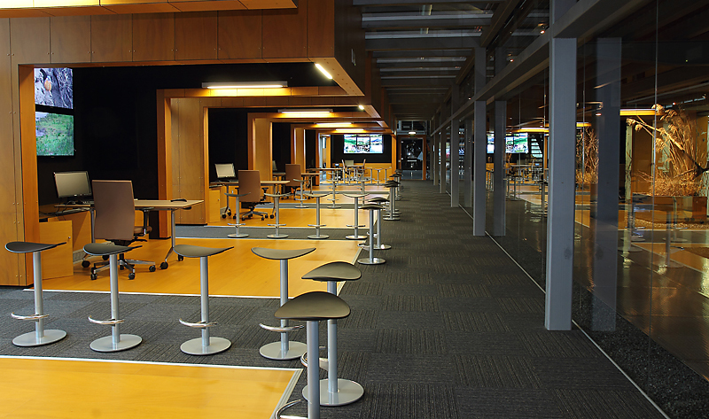 Urdaibai Bird Center. Módulos audiovisuales en el interior del museo.